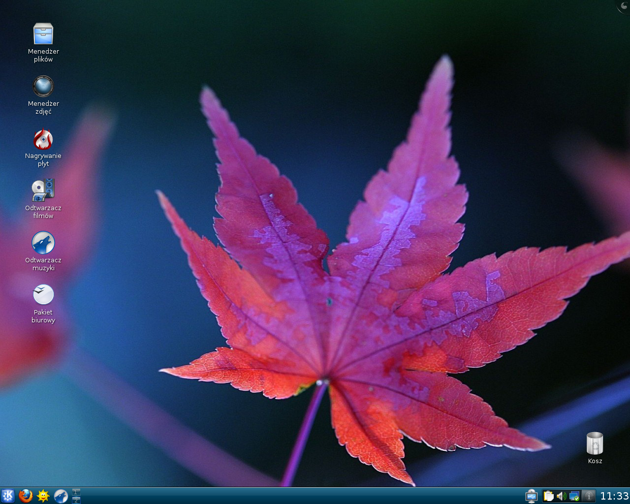 Zrzut ekranu z pulpitu systemu operacyjnego Mandriva Linux 2010